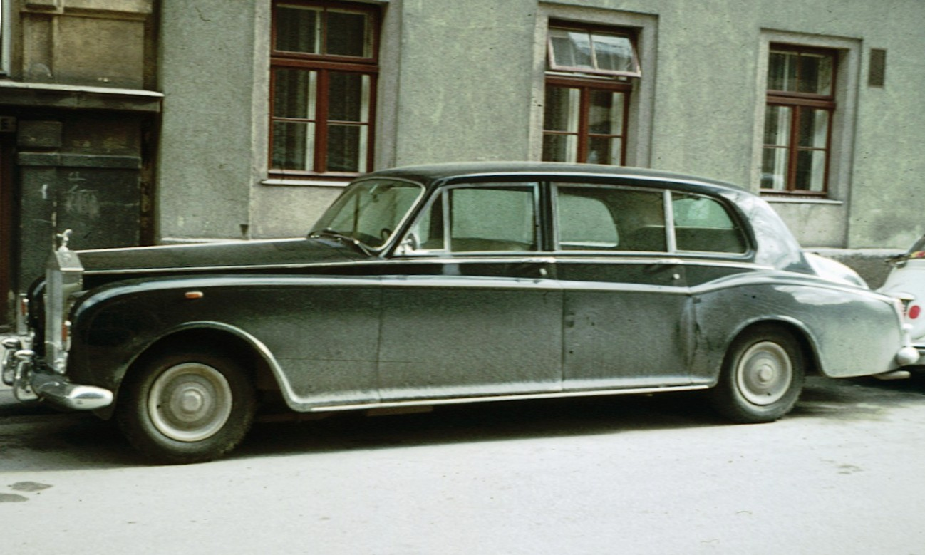 Phantom VI Seitenansicht Wien